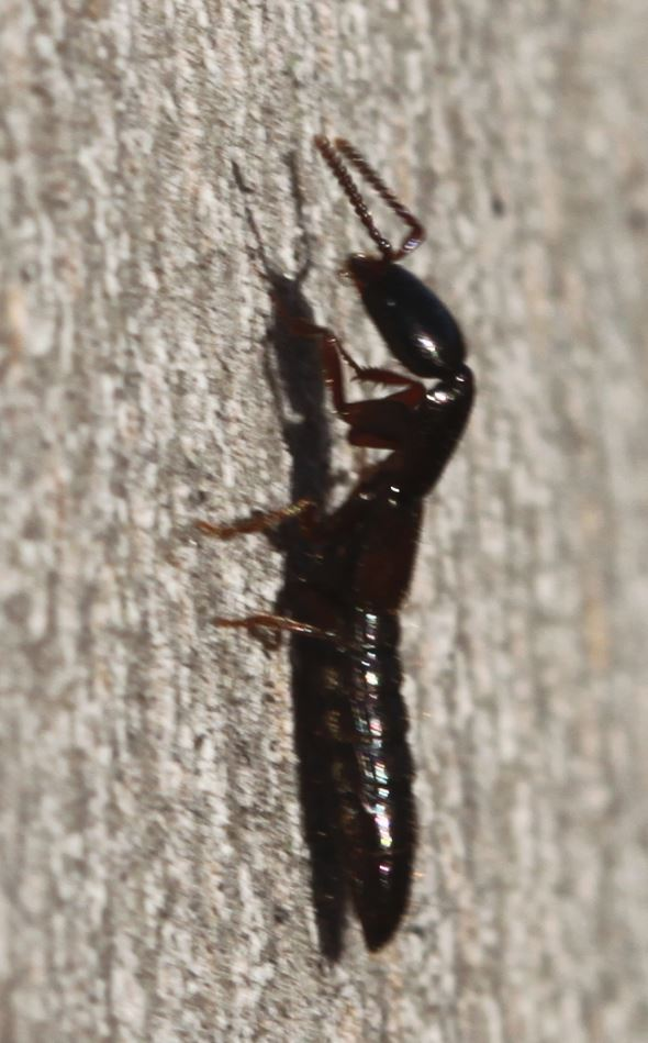 Kurzflügler Xantholinus cf. linearis am 10. Dezember 2019 am Stamm einer Platane in Walldorf/Baden